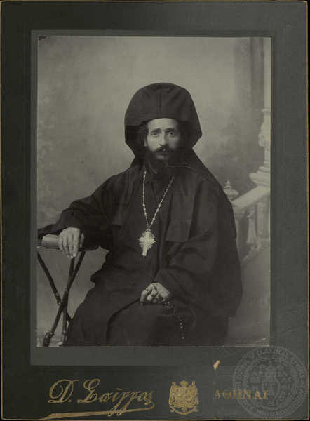 Нилос Клисурски